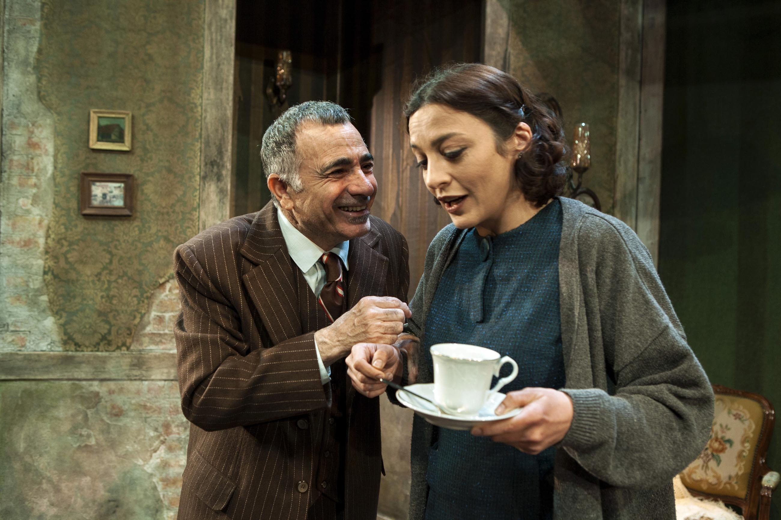 הלנה ירלובה ומשה איבגי בהצגה "אנשים קשים" מאת יוסף בר-יוסף, בבימויו של משה נאור, תיאטרון חיפה, 2012